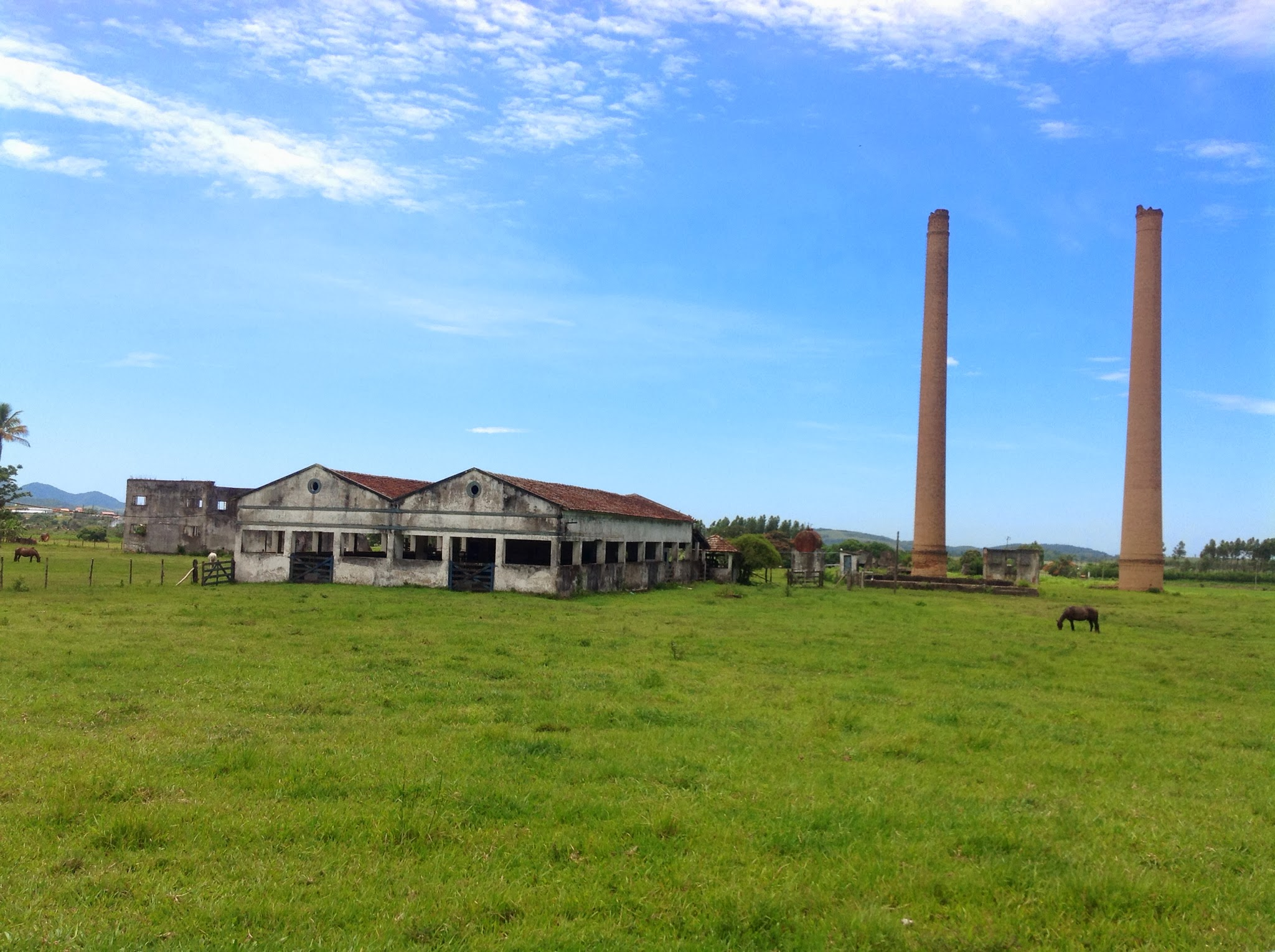 Sampaio Correia, Saquarema - RJ, Brazil